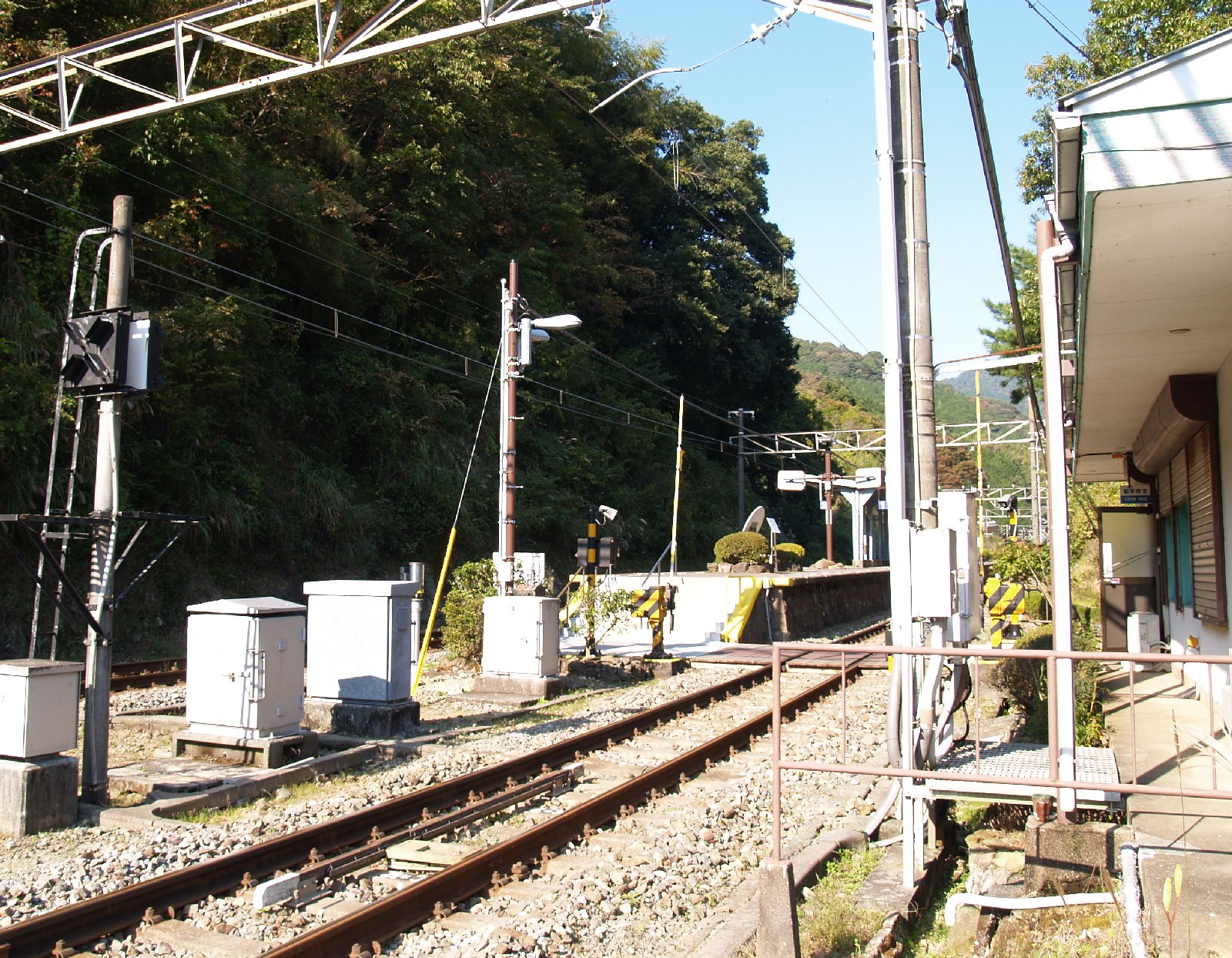 稲梓駅ホーム（駅舎脇から撮影）